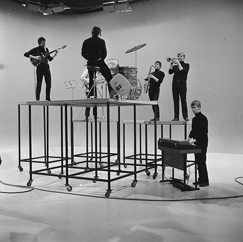 Ekseption in het televisieprogramma Fanclub